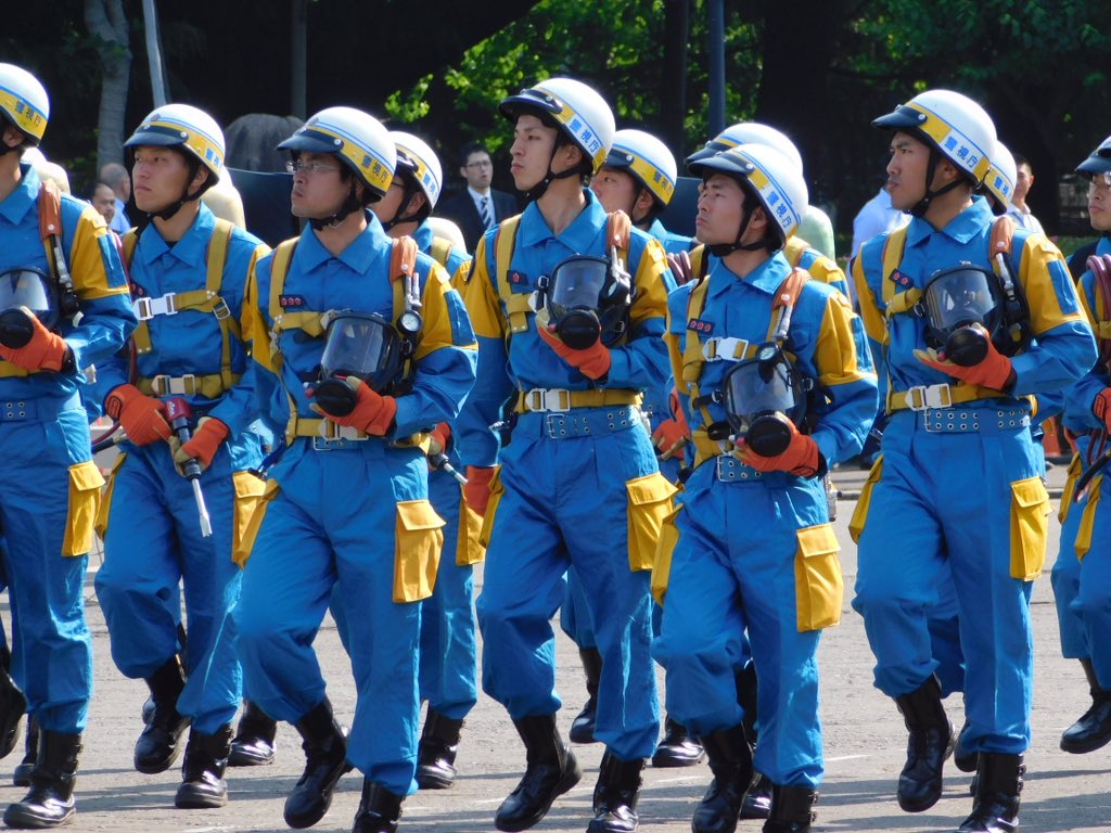 警視庁の広域緊急援助隊。2017年機動隊観閲式で撮影。